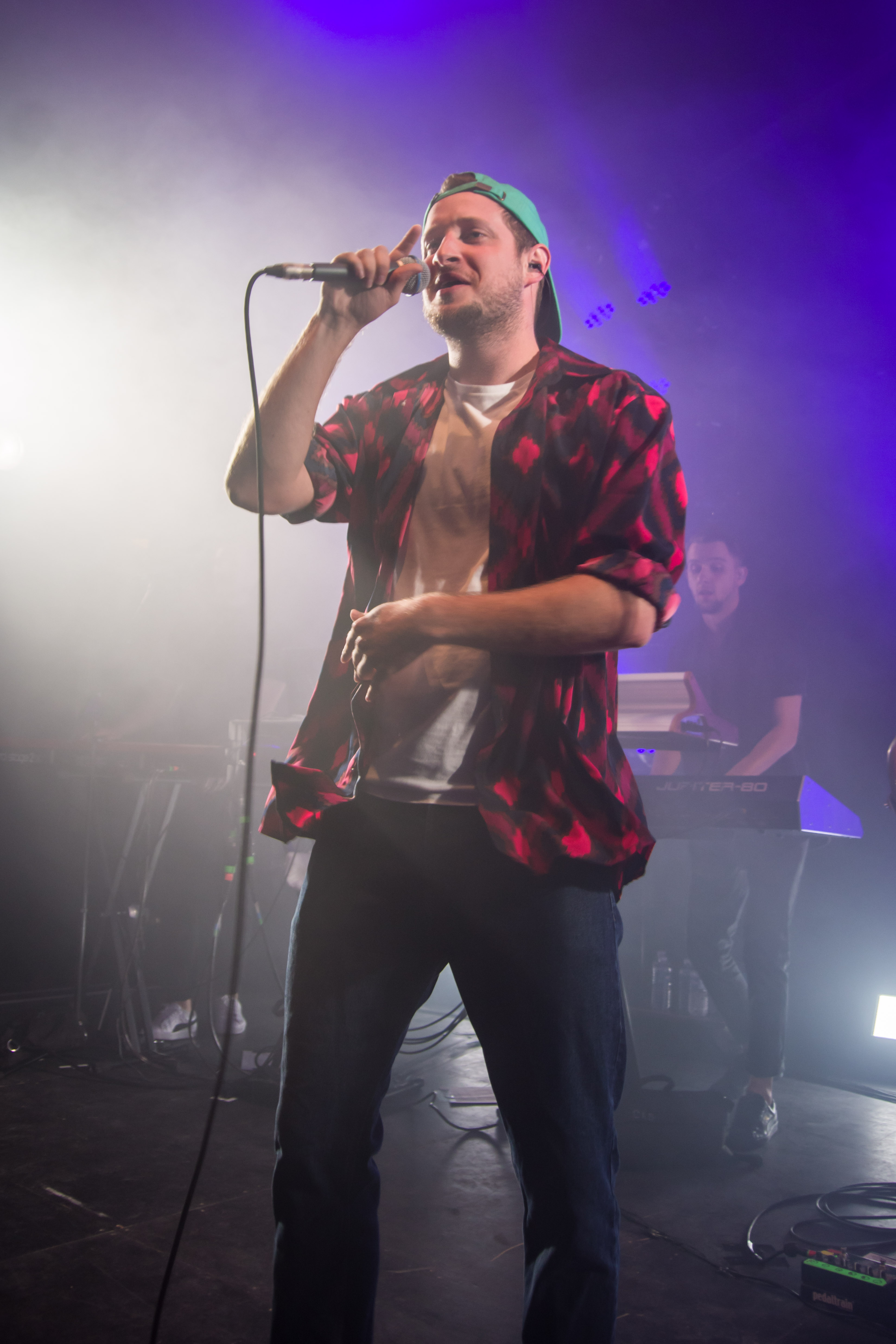 Das Zelt-Musik-Festival 2017 in Freiburg im Breisgau 12.07.2017 Teesy